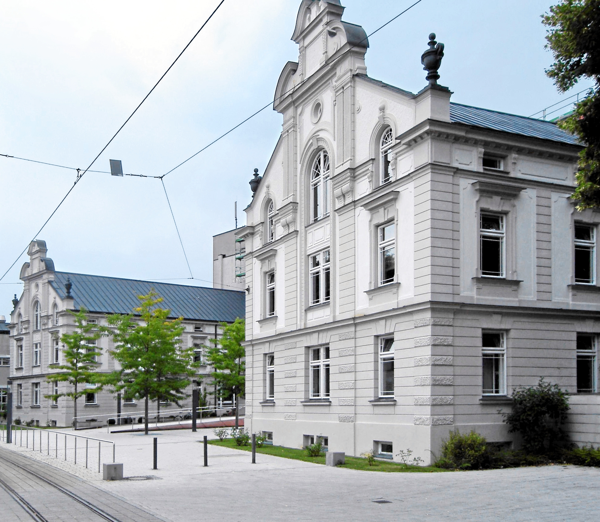 Hessing Klinik Augsburg-Göggingen